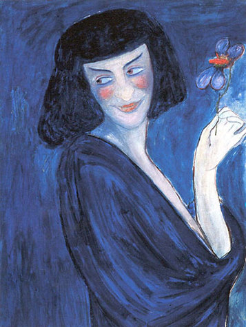 Museo Comunale d'Arte Moderna, Ascona, Schweiz